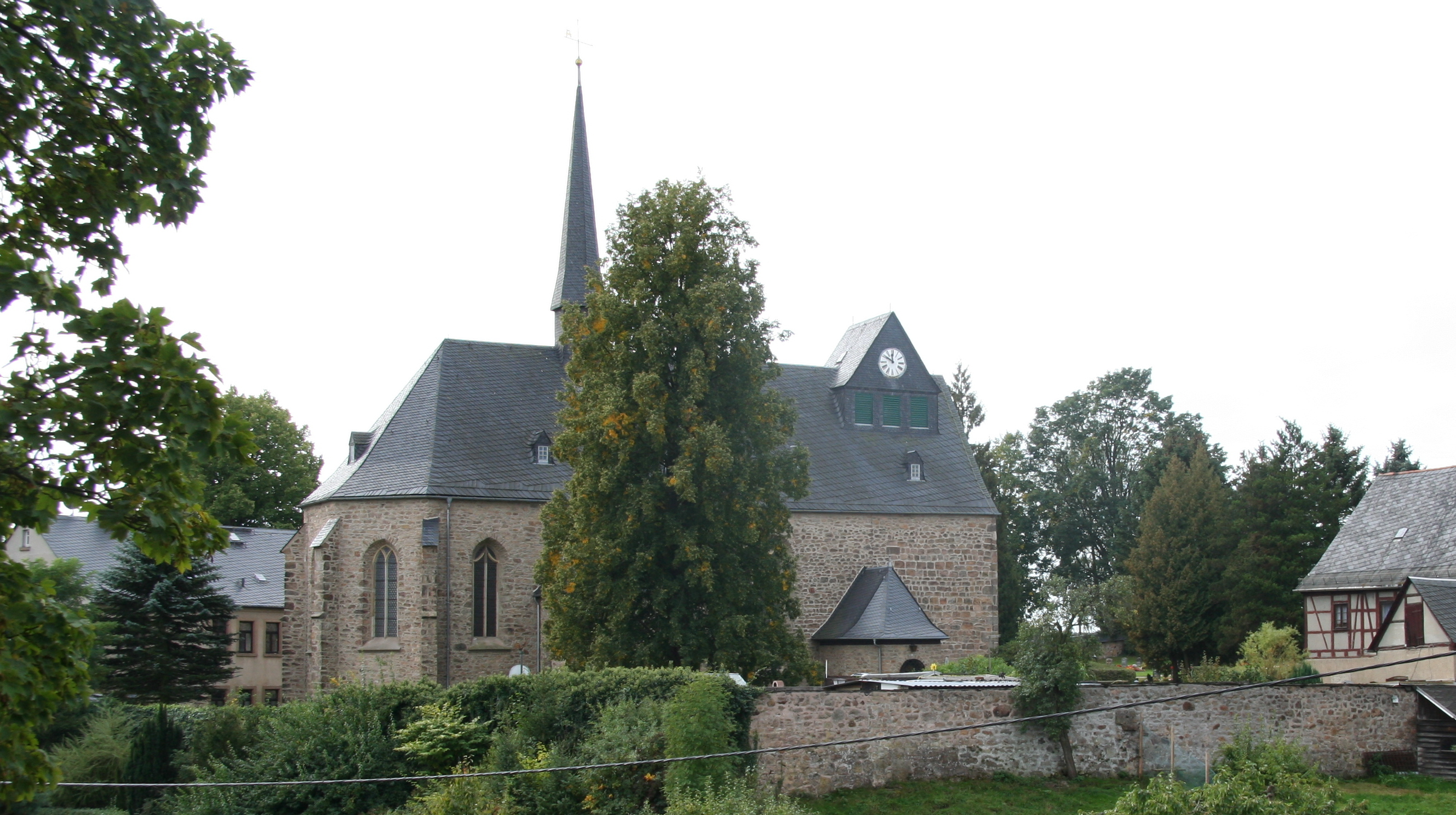 Ensemble aus Pfarrhaus (links im Hintergrund), Michaeliskirche (Mitte), Friedhofsmauer und ehemaliger Schule (rechts) in Hirschfeld